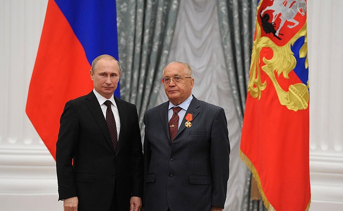 Орденом Александра Невского награждён Виктор Садовничий